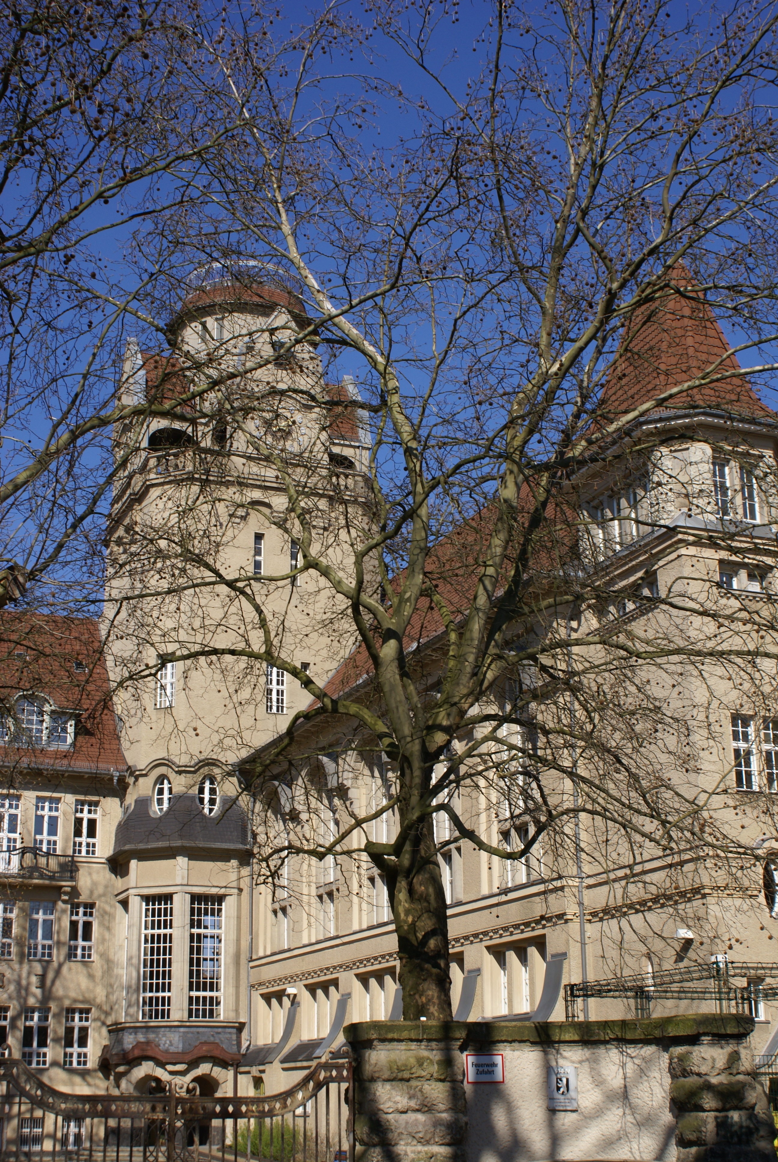 Turm der Rheingau-Oberschule in Friedenau